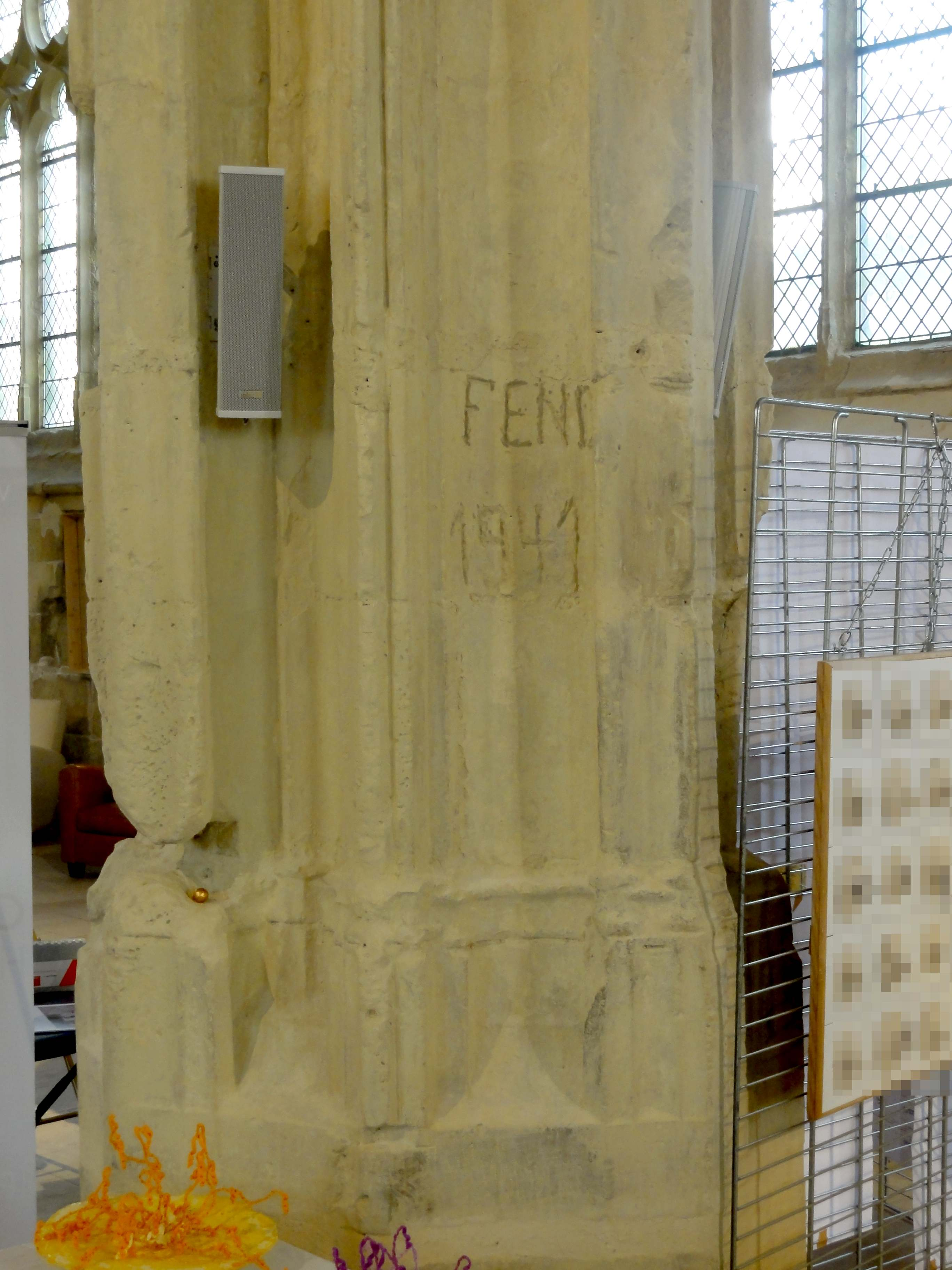 Intérieur de l'église - voir titre.